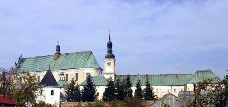 Leżajsk